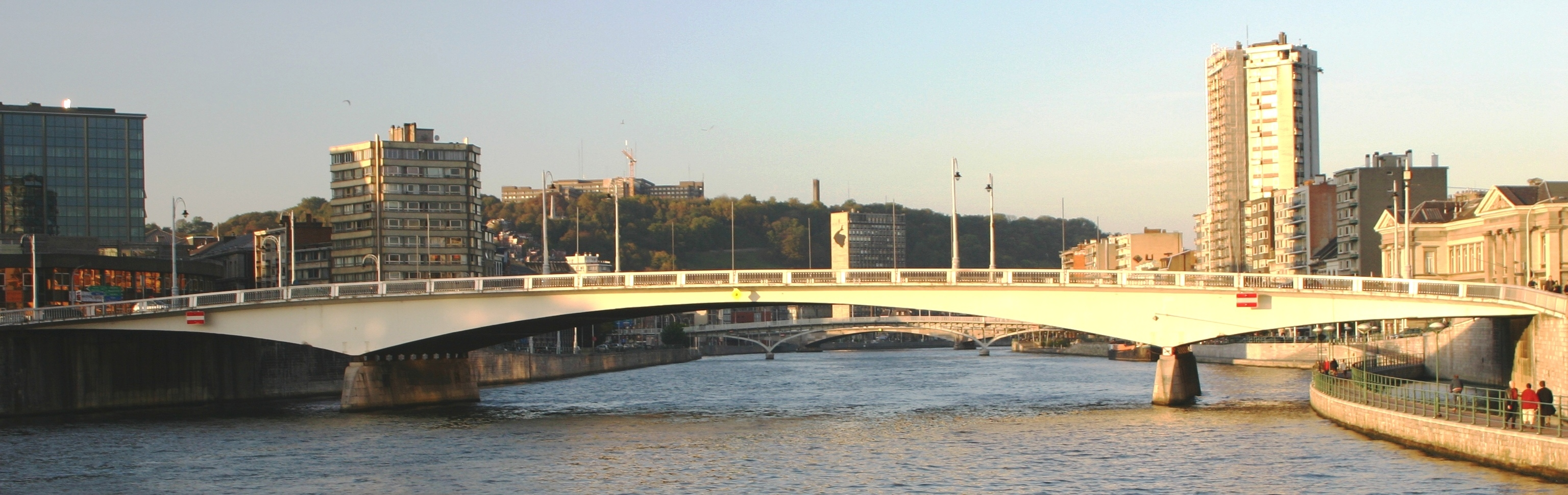 Kennedybréck zu Léck vu riets gesinn. Kategorie:Brécken an der Belsch Kategorie:Brécken iwwer d'Meuse